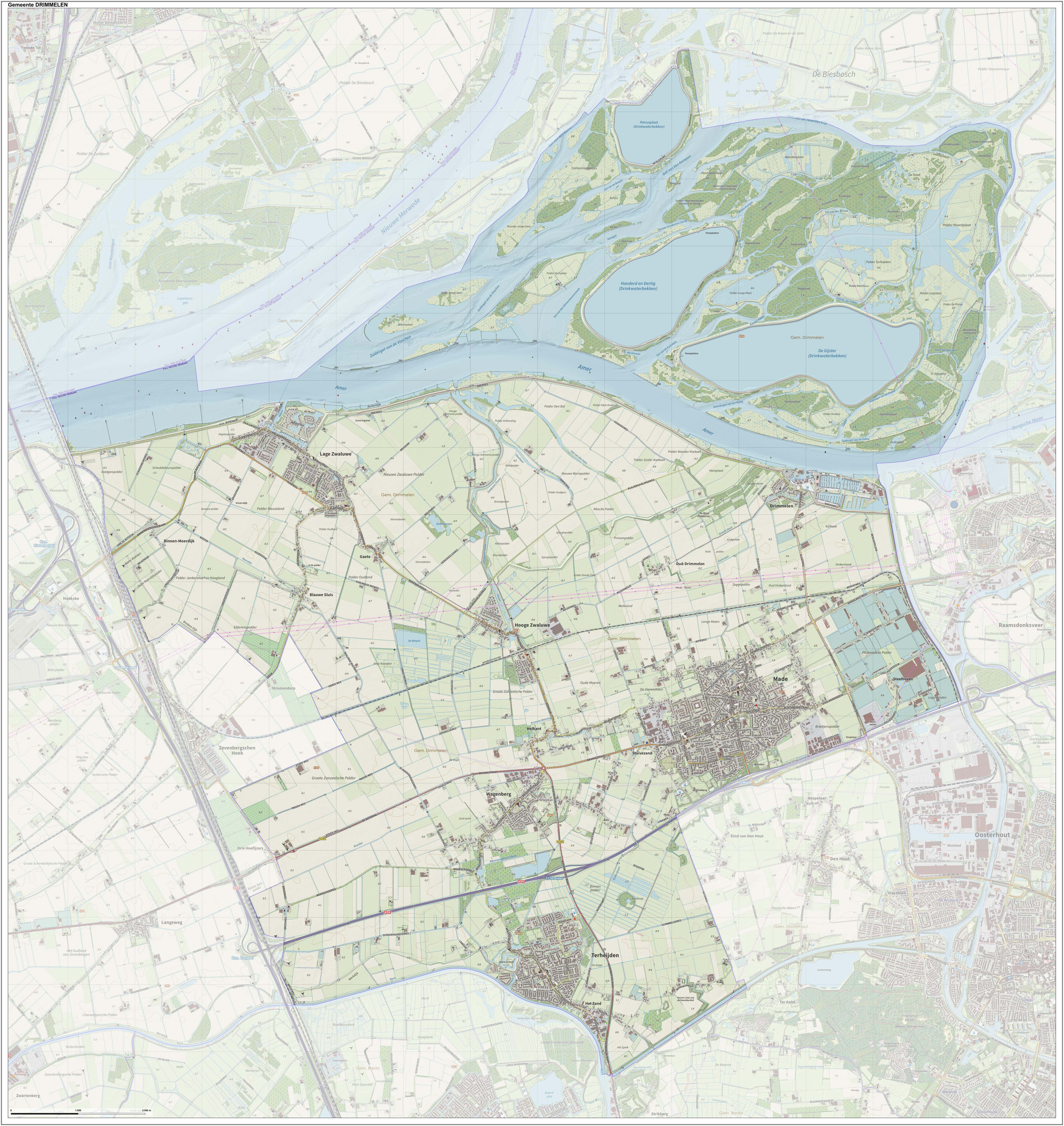 Topografische gemeentekaart. Resolutie: 400 pixels/km. Kaartbeeld samengesteld uit de open geodata van de Top10NL en Top25namen (Kadaster), Creative Commons-BY licentie. Gebouwvlakken uit open geodata BAG extract. Wegen uit de OpenStreetMap, OpenStreetMap community. Reliëfschaduw uit de Actuele Hoogtekaart AHN2. Samenstelling en kleurenschema: Jan-Willem van Aalst, met QGIS. Zie ook de Legenda.